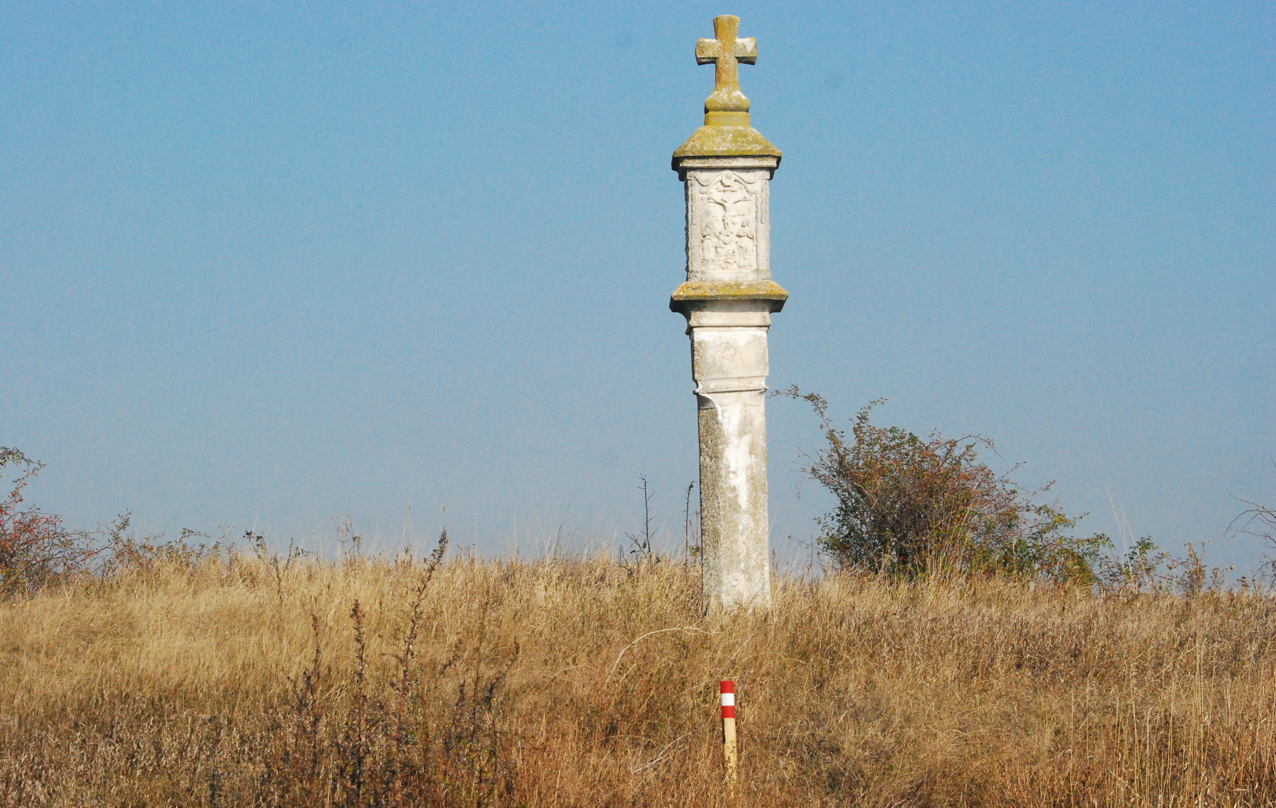 Bildstock, Gerichtsmarterl